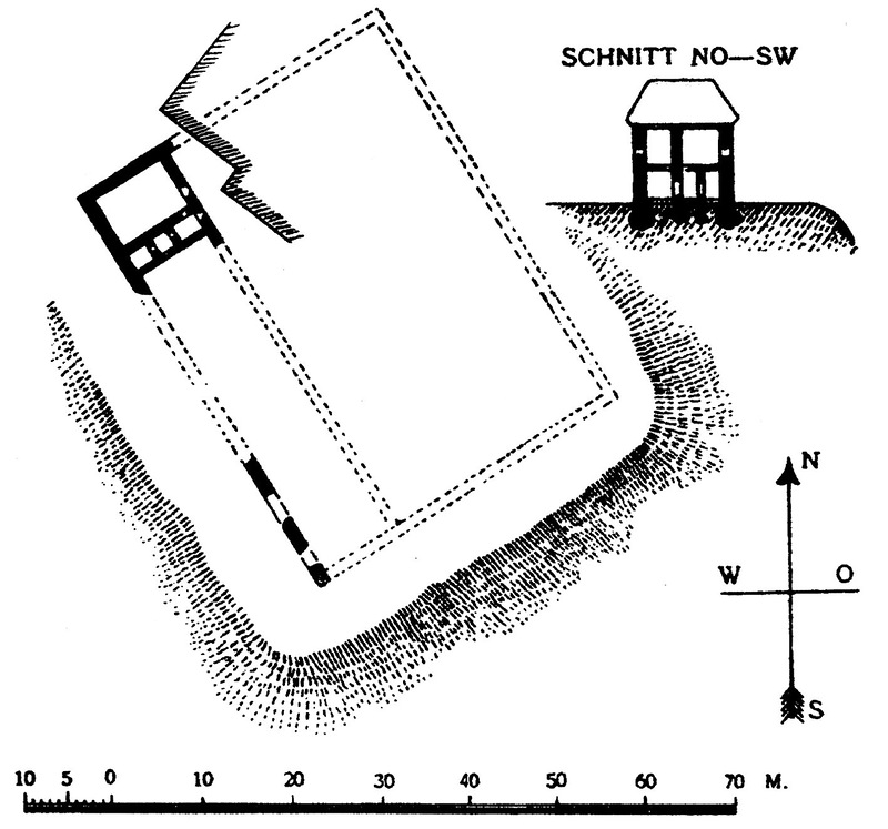 Ajaloolase Karl von Löwis of Menari joonistus 1904. aasta mõõdistamistest.